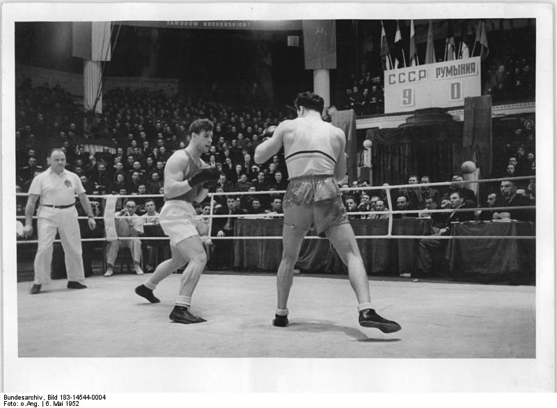 Schizikas, W. Bogice Zentralbild XIII 6.5.1952 Internationales Länderturnier der Amateurboxer in Moskau vom 7.-15.März 1952. Im Moskauer Staatlichen Zirkus fanden die internationalen Freundschaftswettkämpfe von Amateurboxern aus 7 Ländern statt. Im Ring trafen sich die Mannschaften der UdSSR, der CSR, Ungarn, Bulgarien, Polens, Rumäniens und der Deutschen Demokratischen Republik. Der Kampf zwischen den beiden Schwergewichtlern Schozikas (UdSSR) und W. Bogice (Rumänien) dauerte nicht lange. In der zweiten Runde gab Wasile Bogice den Kampf auf. UBz: Links der Sieger Schizikas.